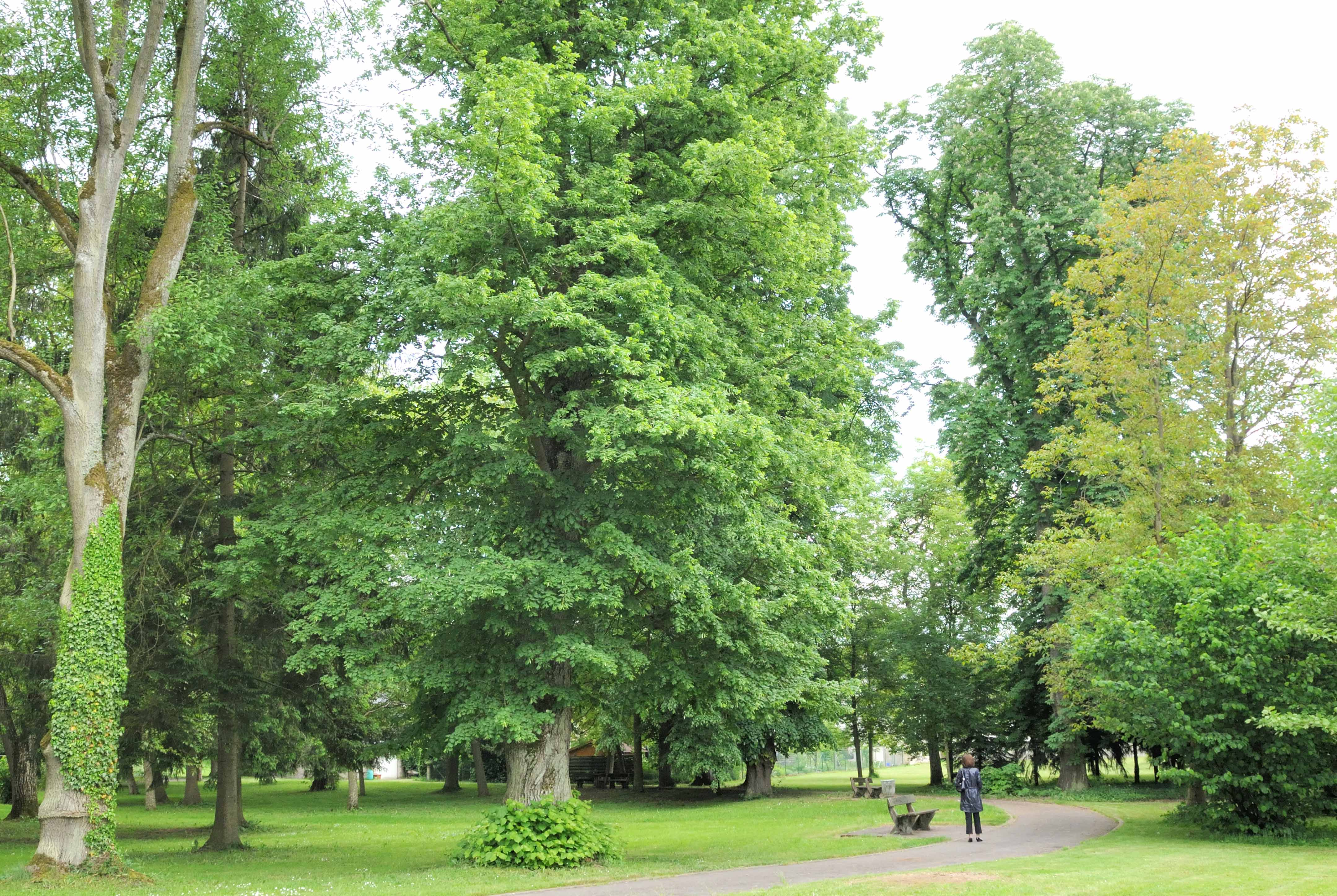 Park zu Bouferdeng. Bouferdeng + Kategorie:Gemeng Luerenzweiler